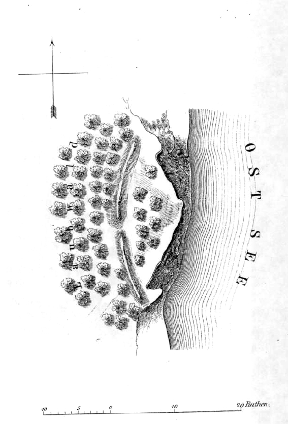 Sattel auf dem Hengst: Rudolf Baier, Die Burgwälle der Insel Rügen nach den auf Befehl Sr. Majestät des Königs im Sommer 1868 unternommenen Untersuchungen, in Baltische Studien AF 24, Stettin 1872, Tafel XI.